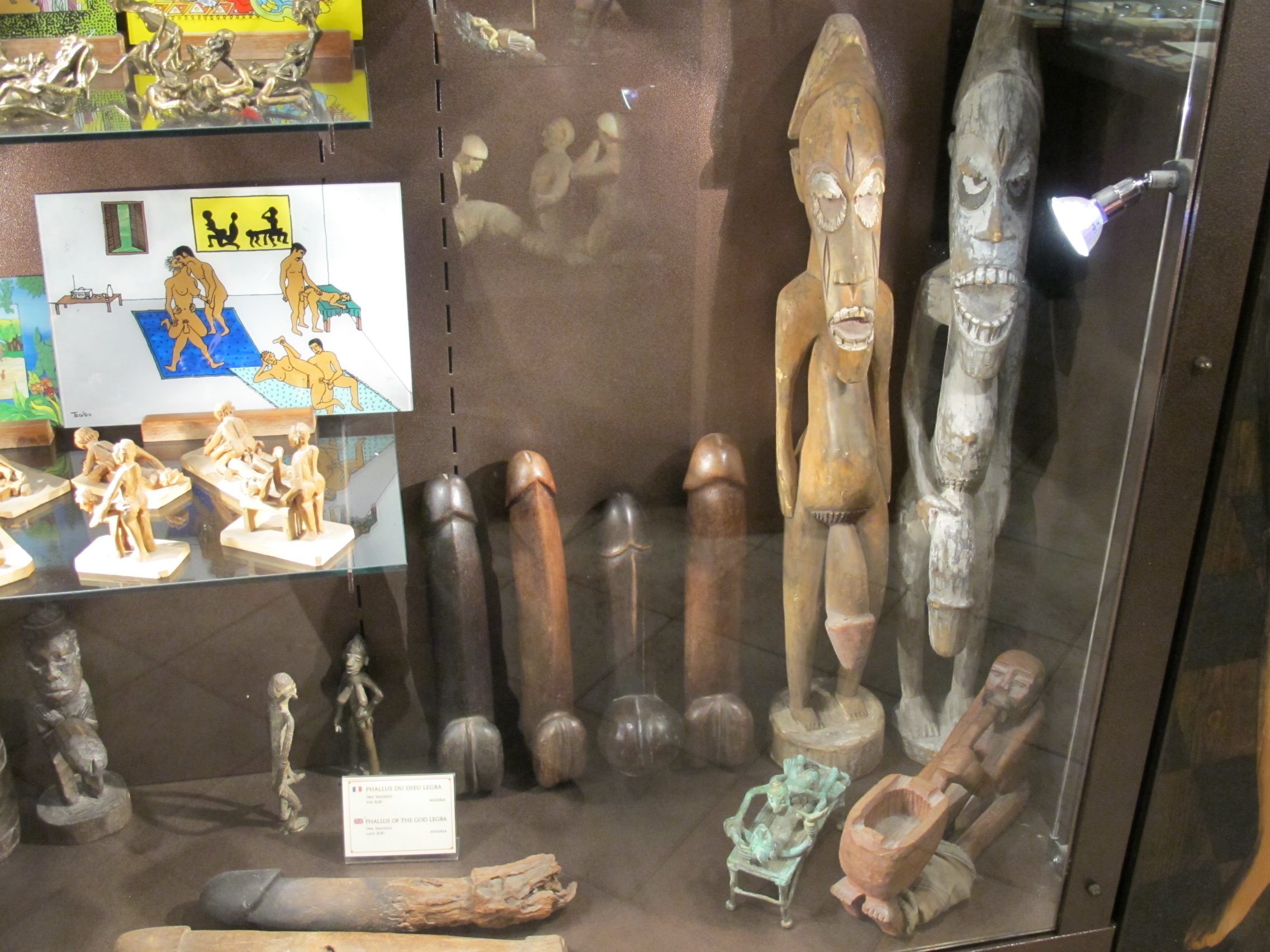 Les collections de Musée de l'érotisme de Paris